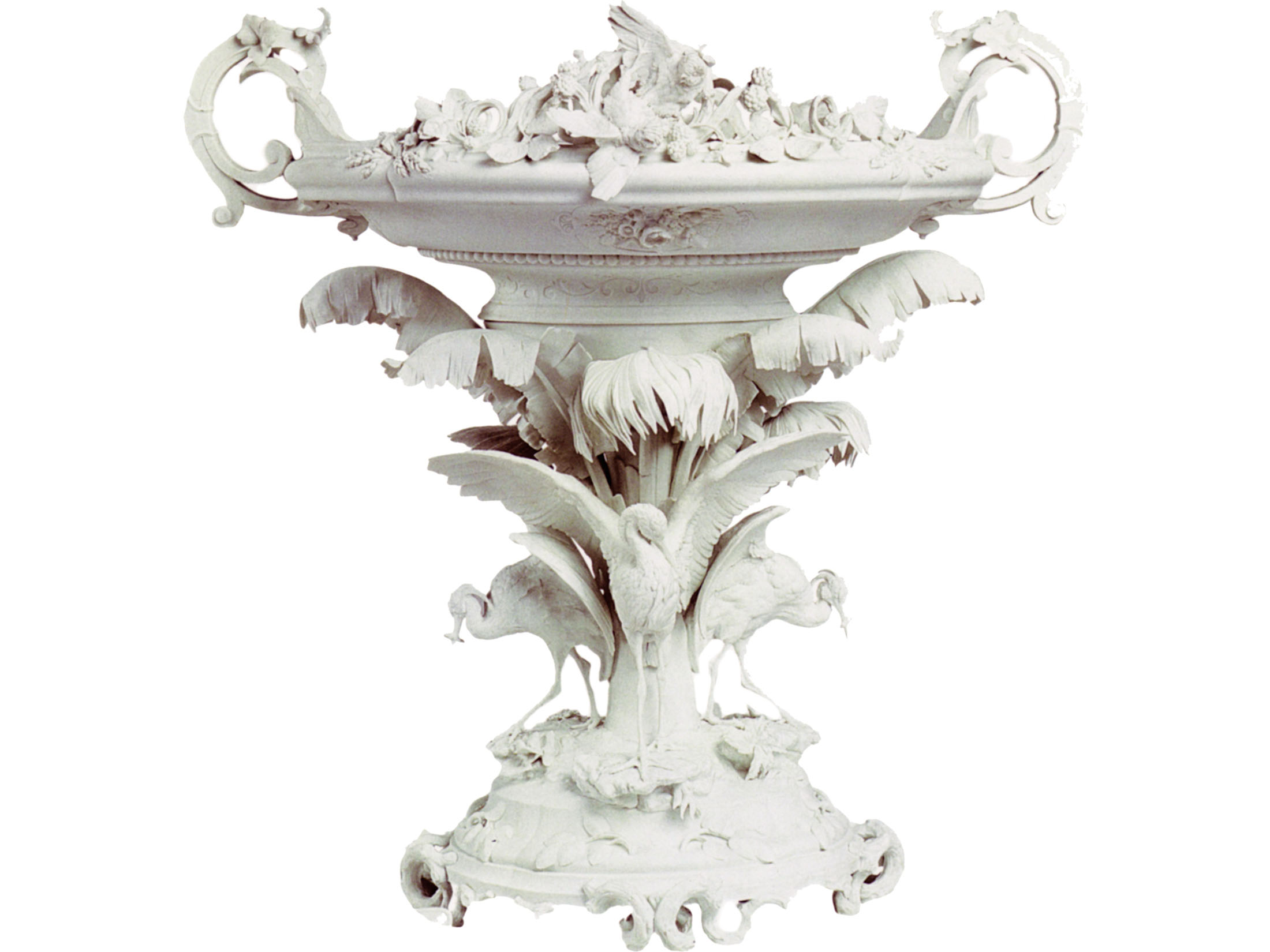 Surtout du service Cérès riche, biscuit de porcelaine dure, Limoges, Manufacture Pouyat, 1855. Premier prix à l'exposition universelle de paris de 1855.